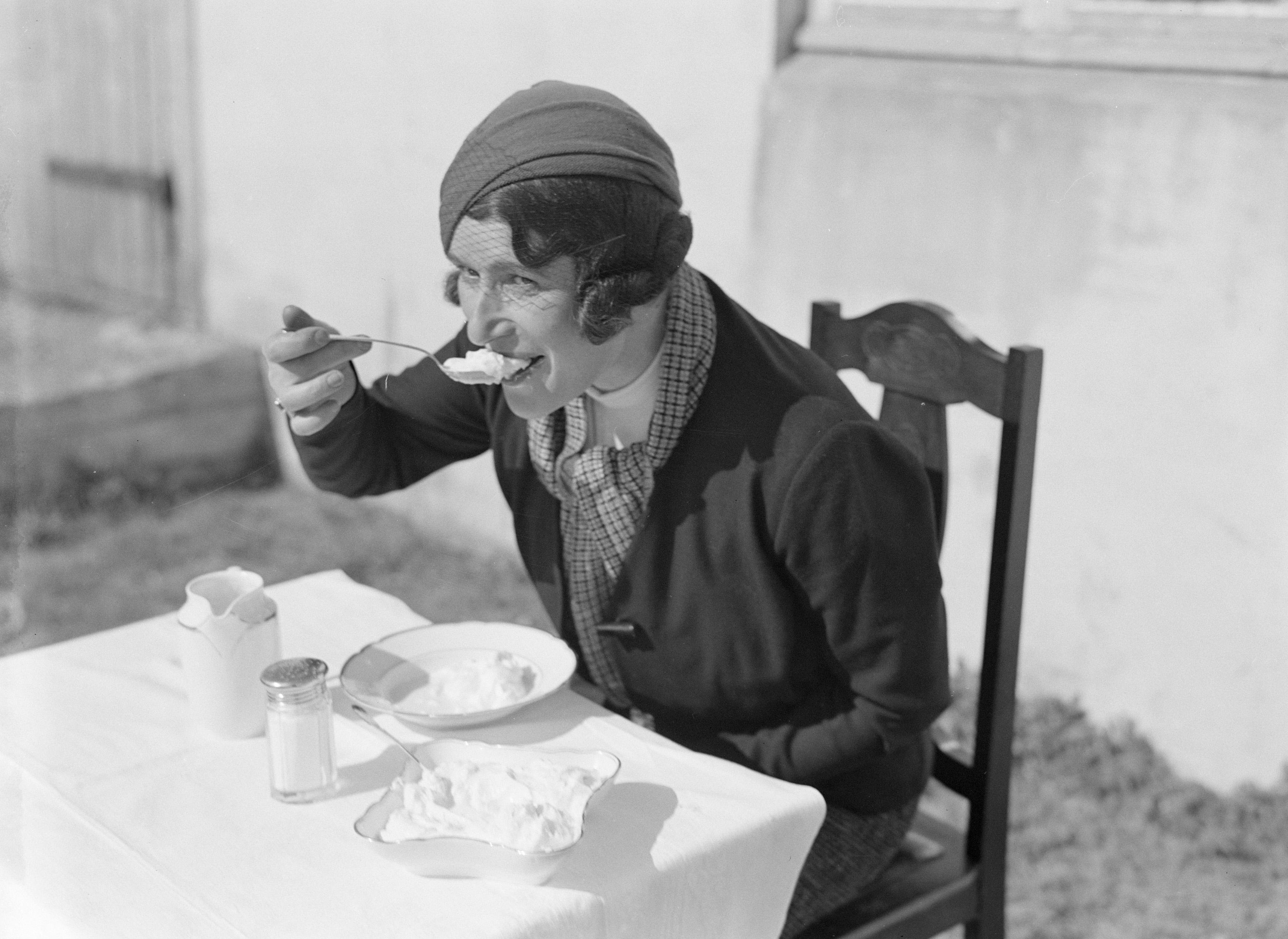 Collectie / Archief : Fotocollectie Van de Poll Reportage / Serie : IJsland Beschrijving : De Duitse journaliste Anita Joachim geniet van een portie skyr Datum : 1934 Locatie : IJsland Trefwoorden : journalisten, maaltijden Persoonsnaam : Joachim, Anita Fotograaf : Poll, Willem van de Auteursrechthebbende : Nationaal Archief Materiaalsoort : Glasnegatief Nummer archiefinventaris : bekijk toegang 2.24.14.02 Bestanddeelnummer : 190-0483